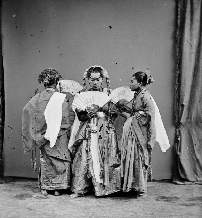 Negatief. 'Padjogé' danseressen te Maros, Celebes